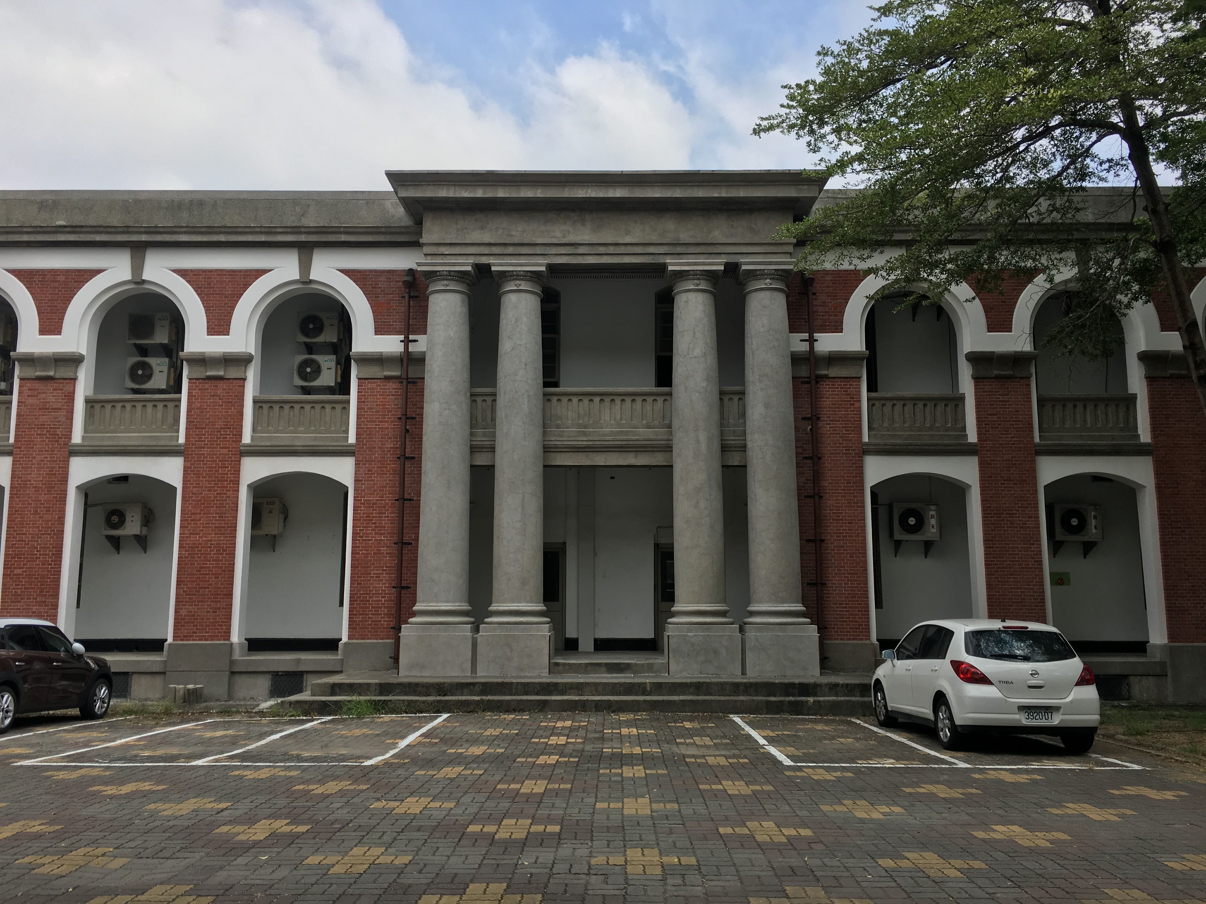 原日軍步兵第二聯隊營舍，今成功大學大成館（工設系館）之南面。